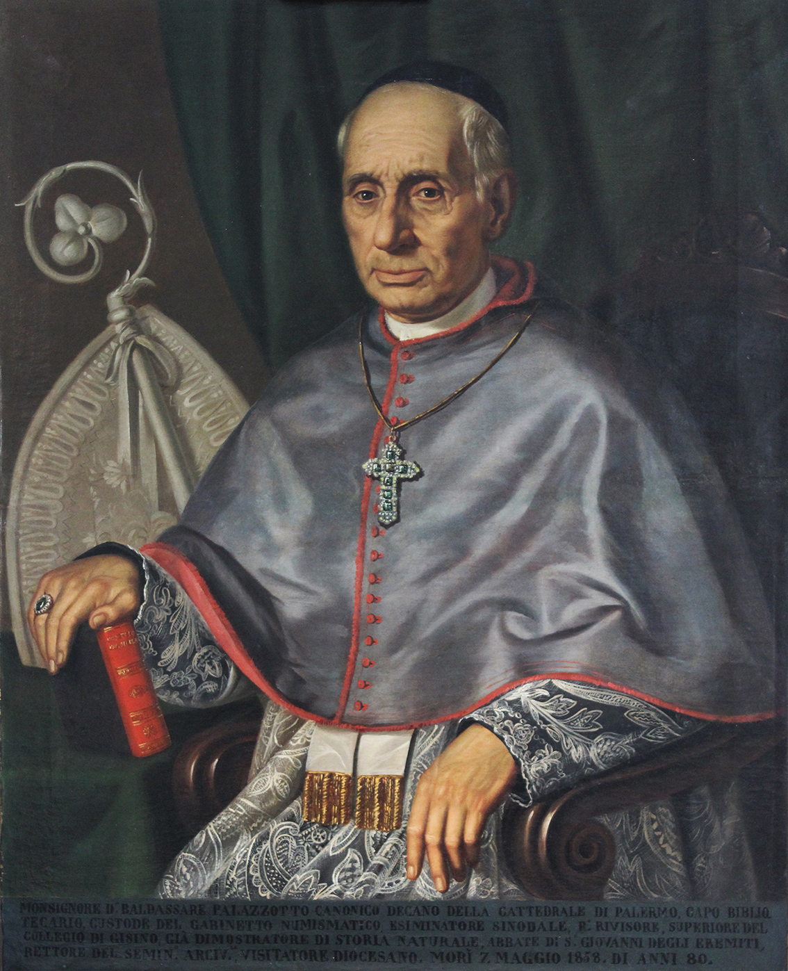 Baldassare Palazzotto (1777-1858), restored painting